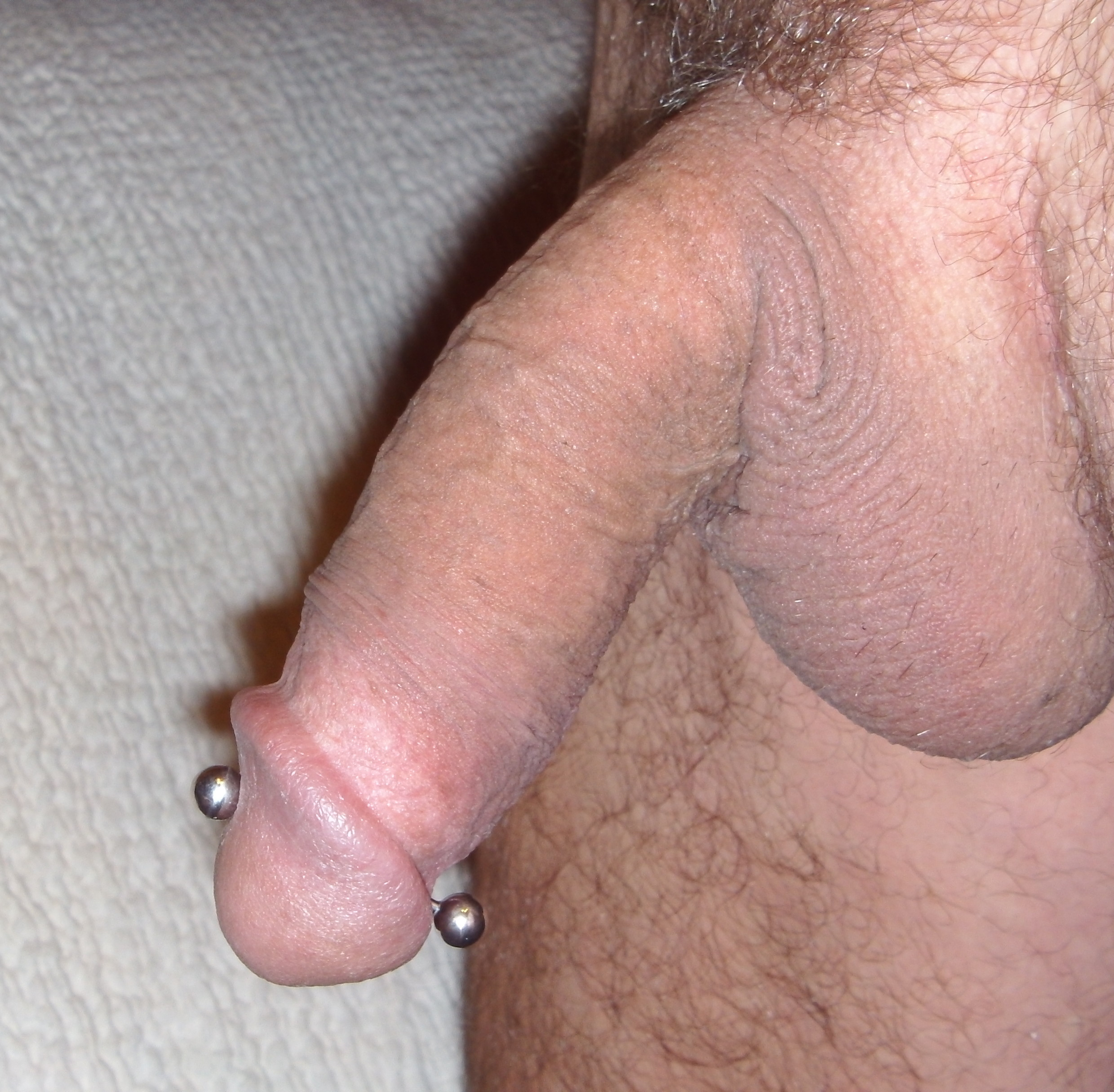 seit kurzem auch ein Apa Piercing, 35mm langer, 2,6mm starker Stab und 8mm Verschlusskugeln